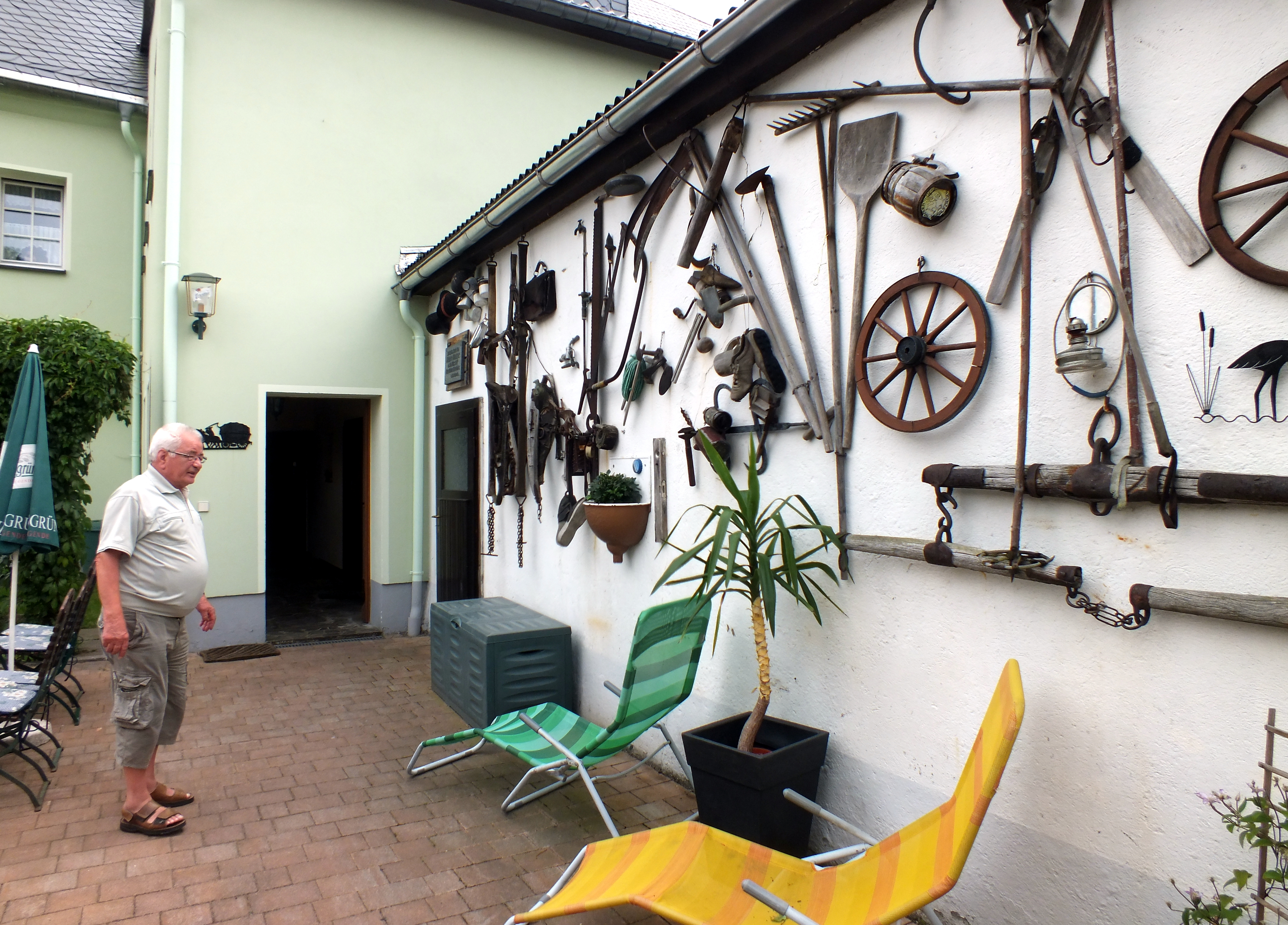 Bierquelle in Schlettau, Hofansicht mit Gastwirt